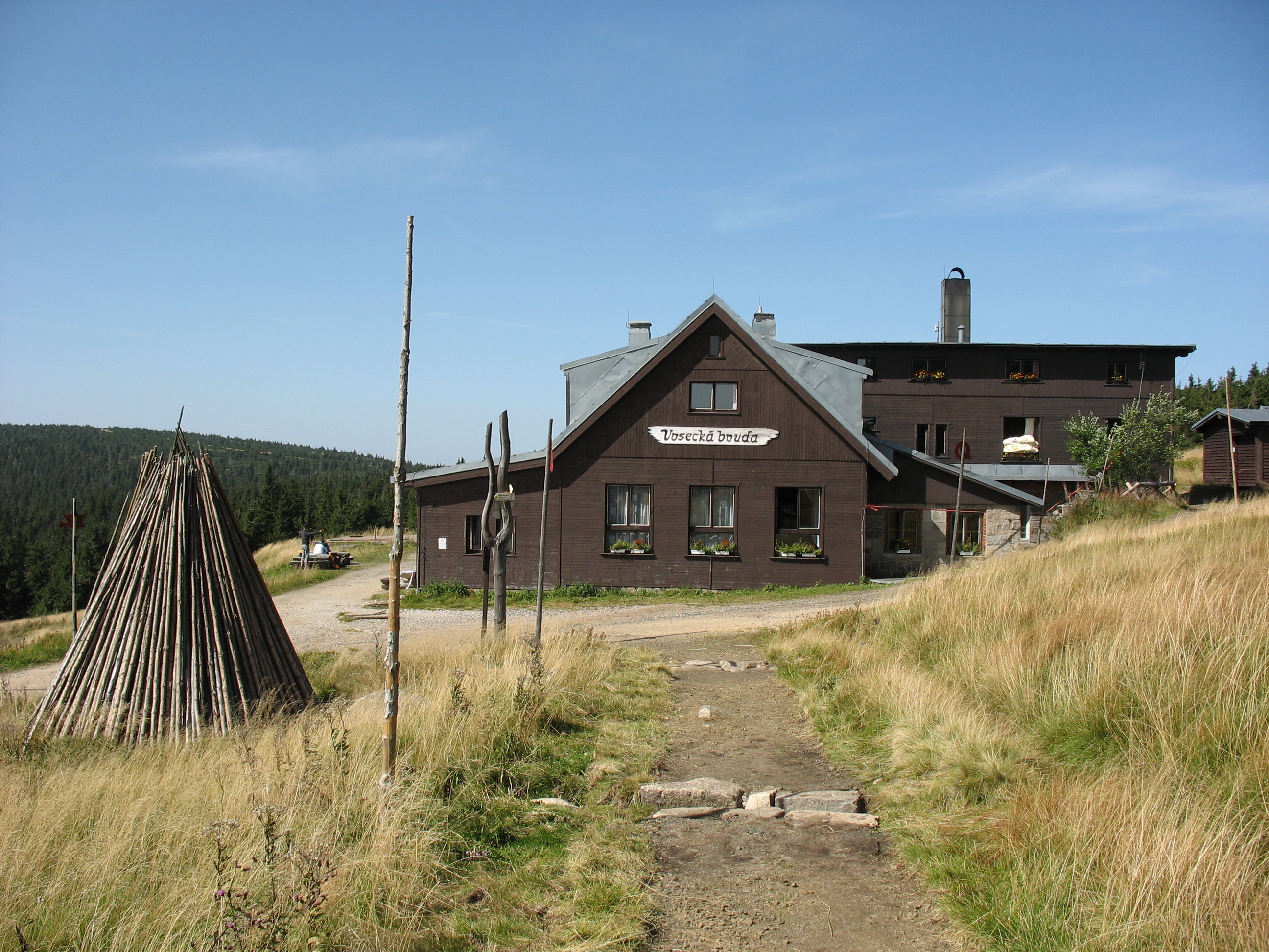 Vosecká bouda